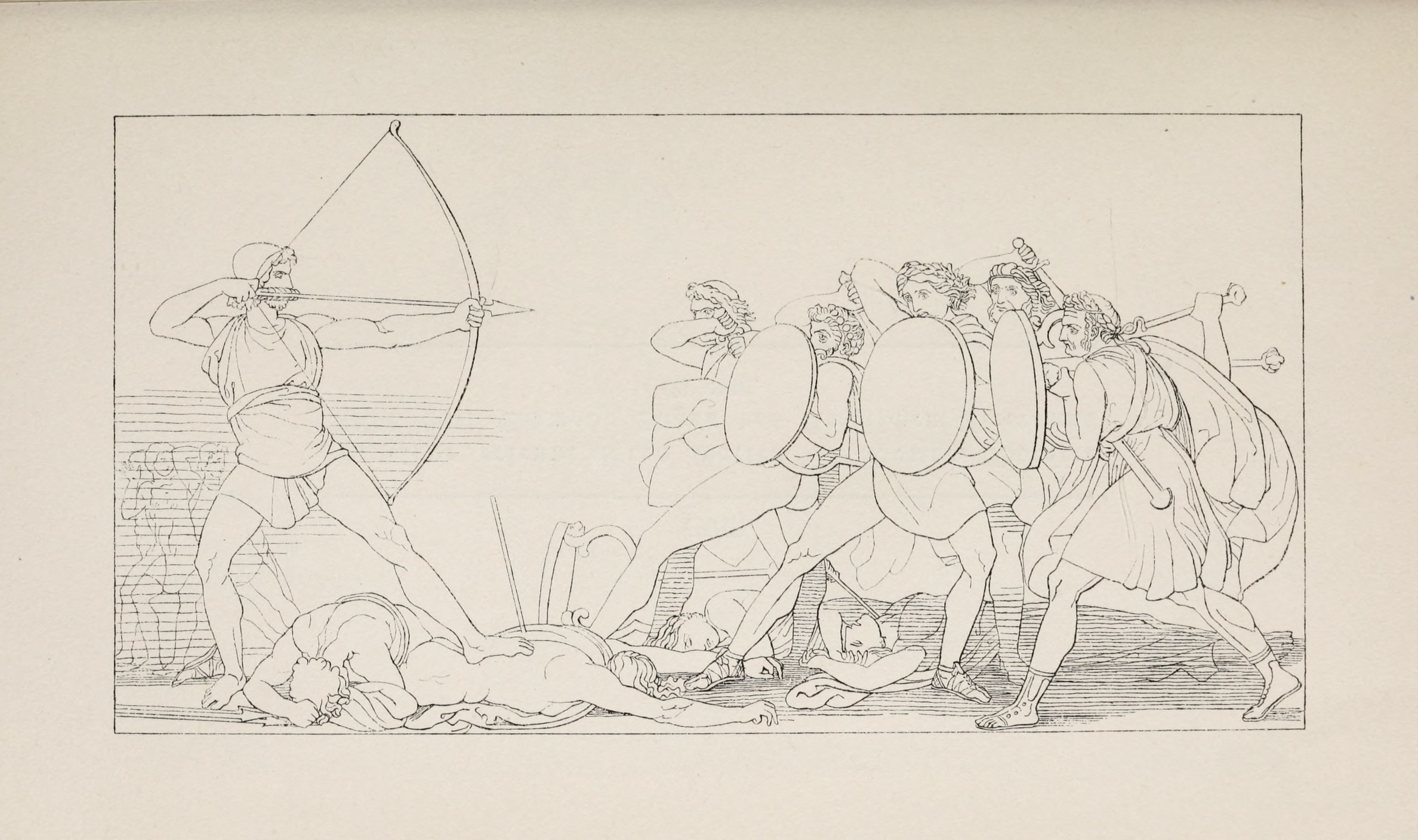 Das Ende der Freier. – Homer, Odyssee XXII. 90. Schwab, Sagen des klassischen Altertums II. 359.